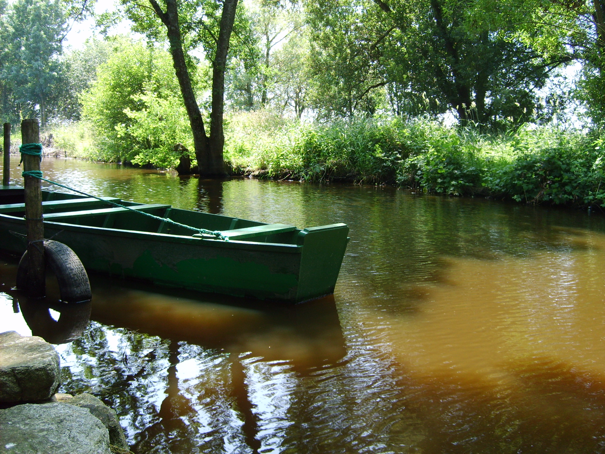 Canal dans la Brière, Loire-Atlantique, France. Canal in the Brière, Loire-Atlantique, France.